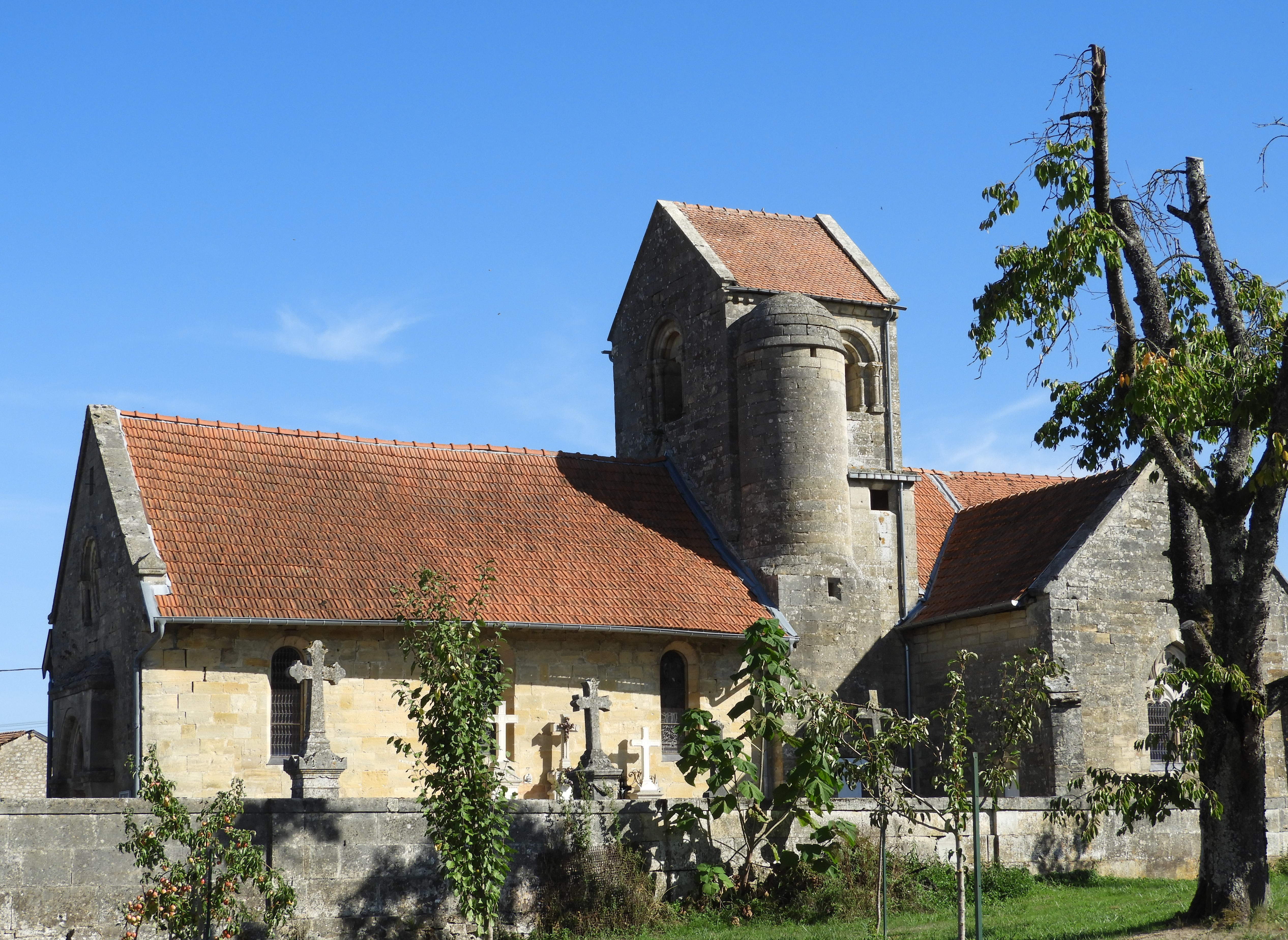 L'Église Saint-Pierre de Vassincourt (PA00106646), commune du département de la Meuse, prise en photo le 11 septembre 2018.